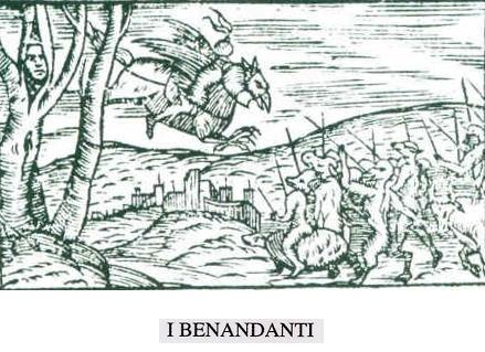 Benandanti che cavalcano animali combattendo i demoni